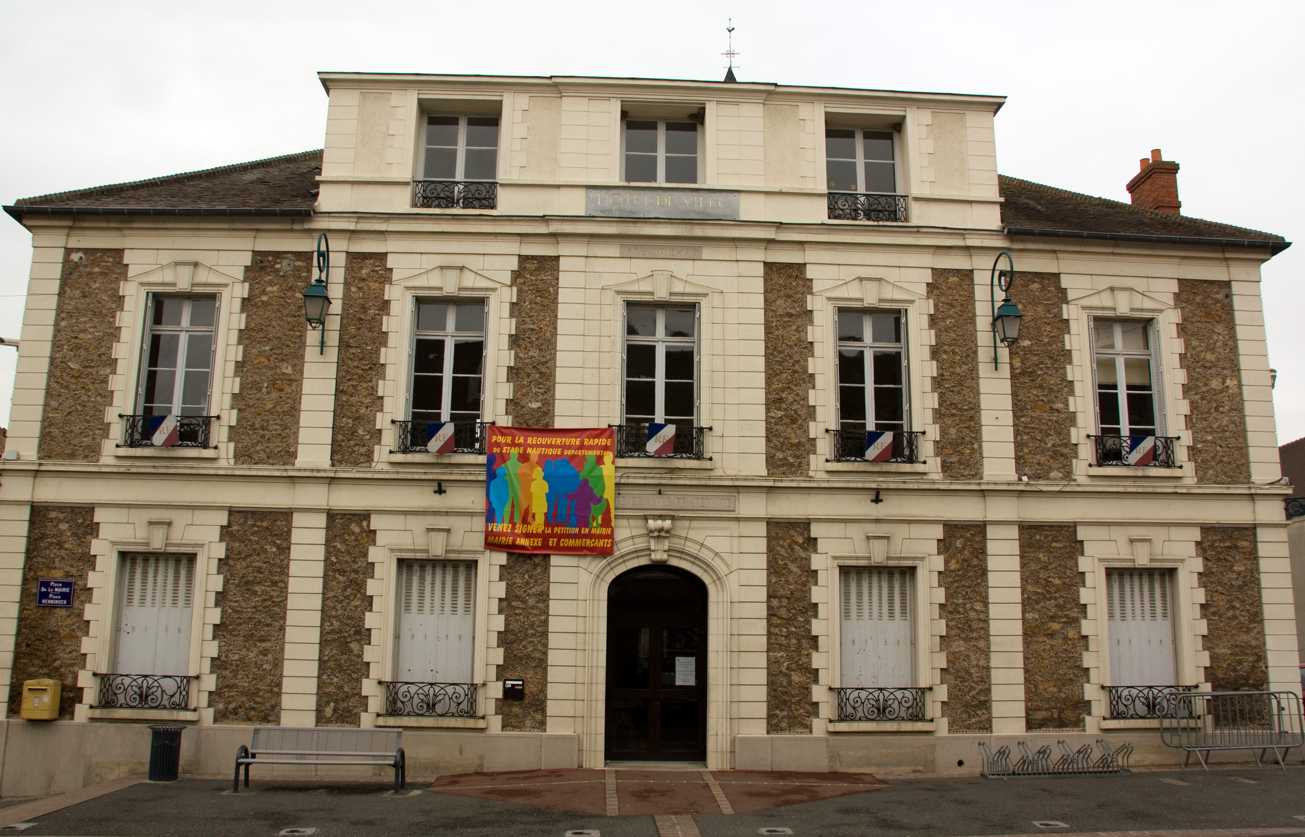 Mairie de Mennecy, Mennecy, Essonne, France